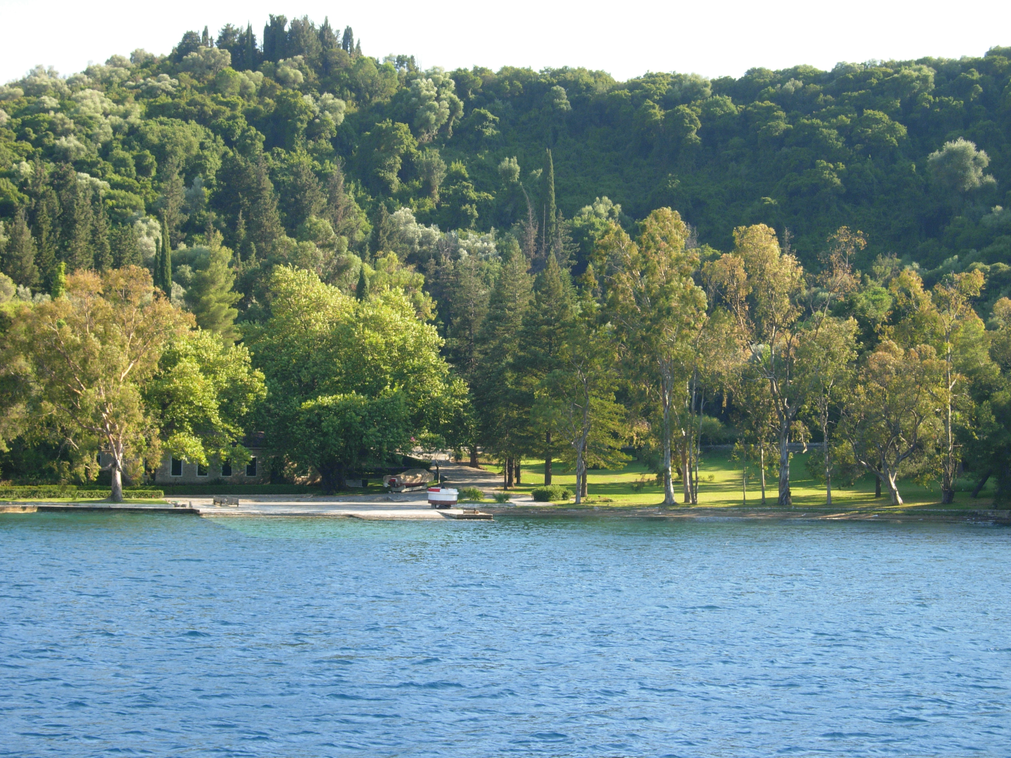 Soukromý ostrov Skorpios